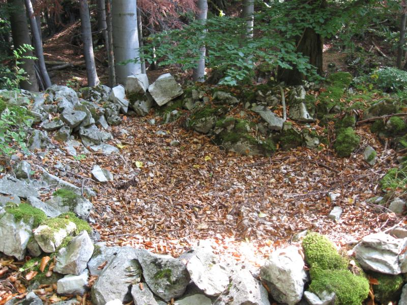 Hrádek u Babic